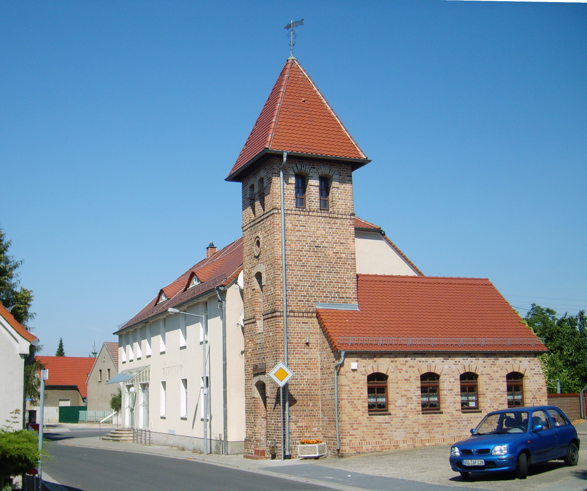 Das Dorf Grünewalde bei Lauchhammer. Lindenallee, vorn der Schulplatz: links Schulplatz 10, rechts Schulplatz 2 mit Heimatstube und Glockenturm, dann Abzweig Maasbergstraße, geradeaus hinten Schulplatz 4.